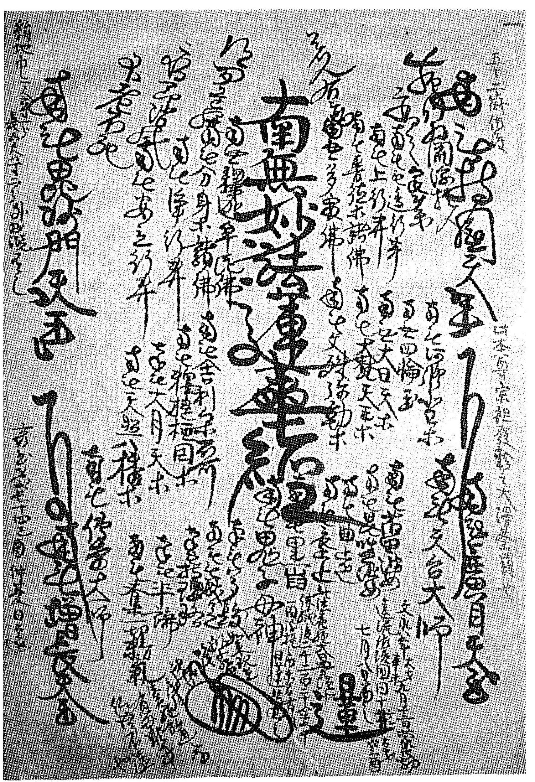 佐渡始顕本尊 日亨写本